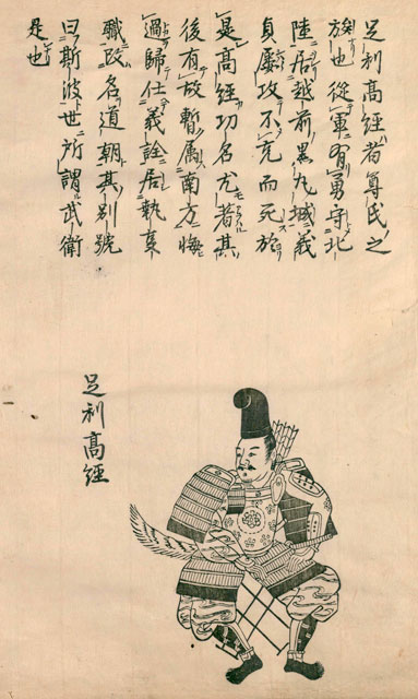 斯波高経肖像